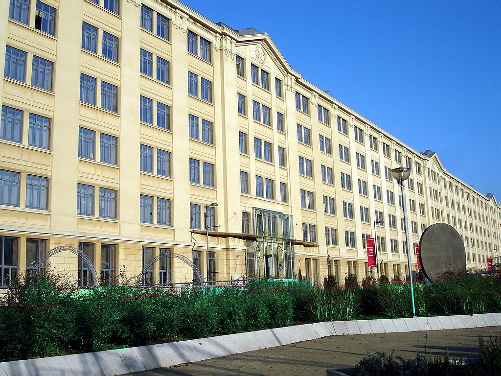 L'immeuble de Manufrance, aujourd'hui réhabilité en pôle tertiaire. (je suis l'auteur de cette image et en concède les droits à Wikipédia)